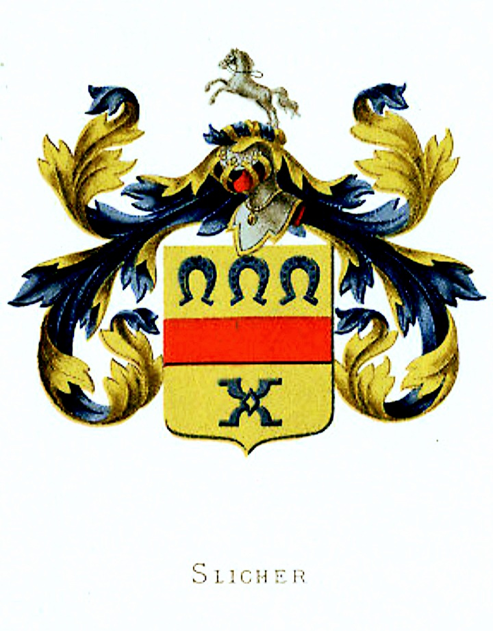 Wappen derer Slicher, niederländische Linie.